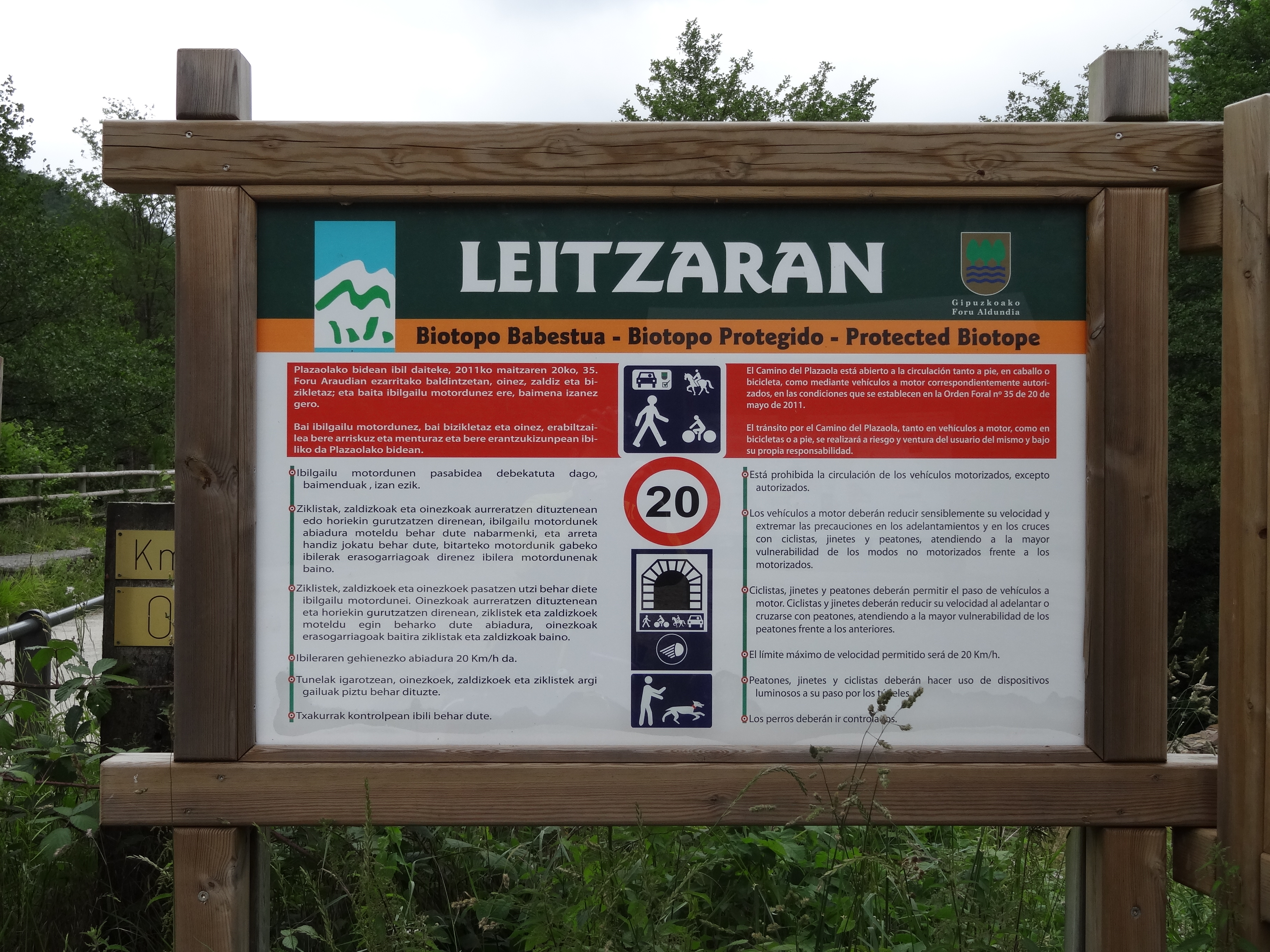 A la Vía Verde del Plazaola